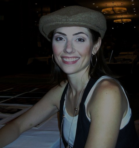 Autore: S. Buchanan Fonte: Nome utente Wikipedia: Smbuchanan